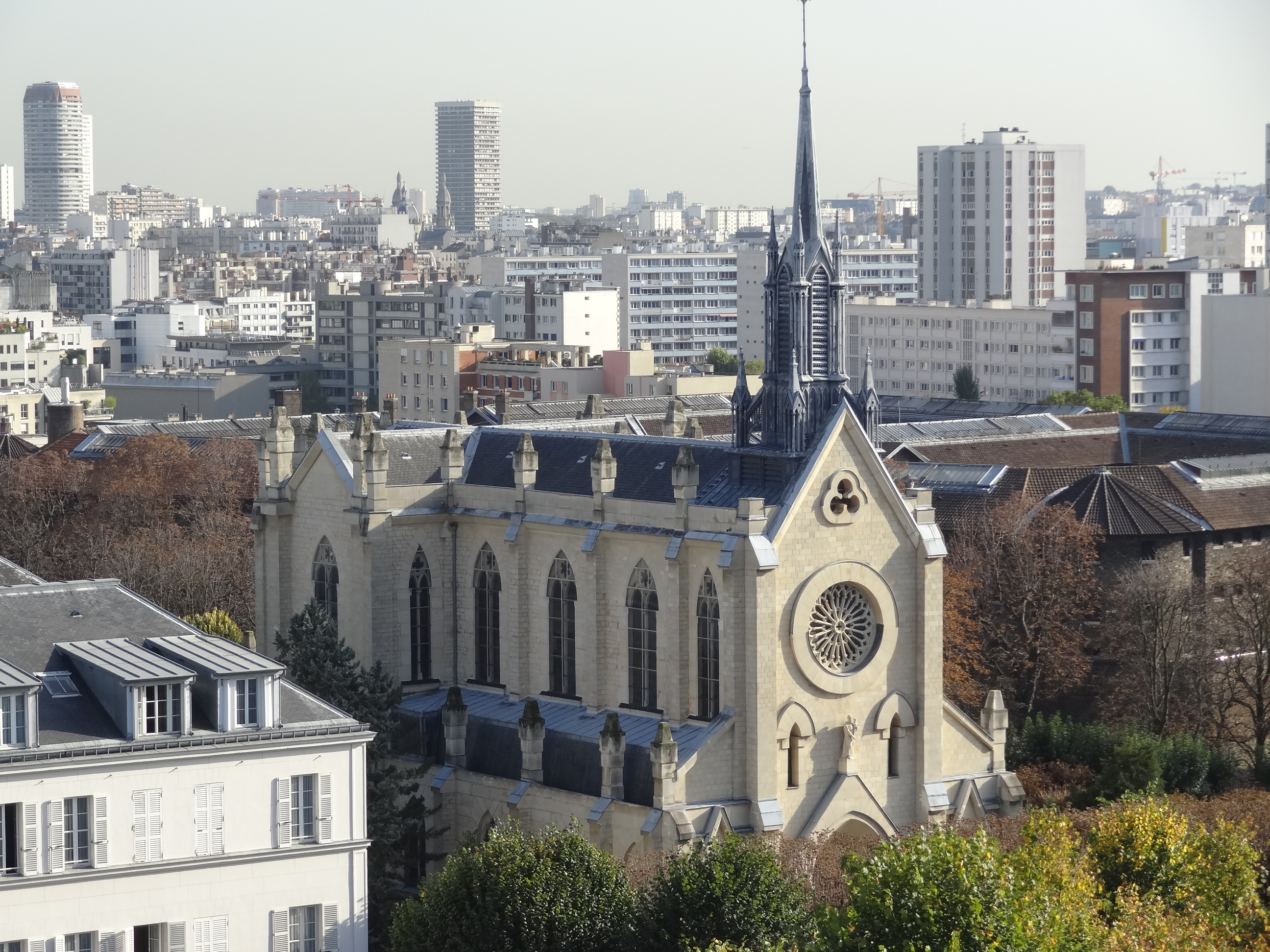 Église Saint-Joseph-de-Cluny (Paris) dans la maison mère des sœurs de Saint-Joseph-de-Cluny, 21 rue Méchain à Paris 14e. Vue depuis la terrasse de l'Observatoire de Paris.